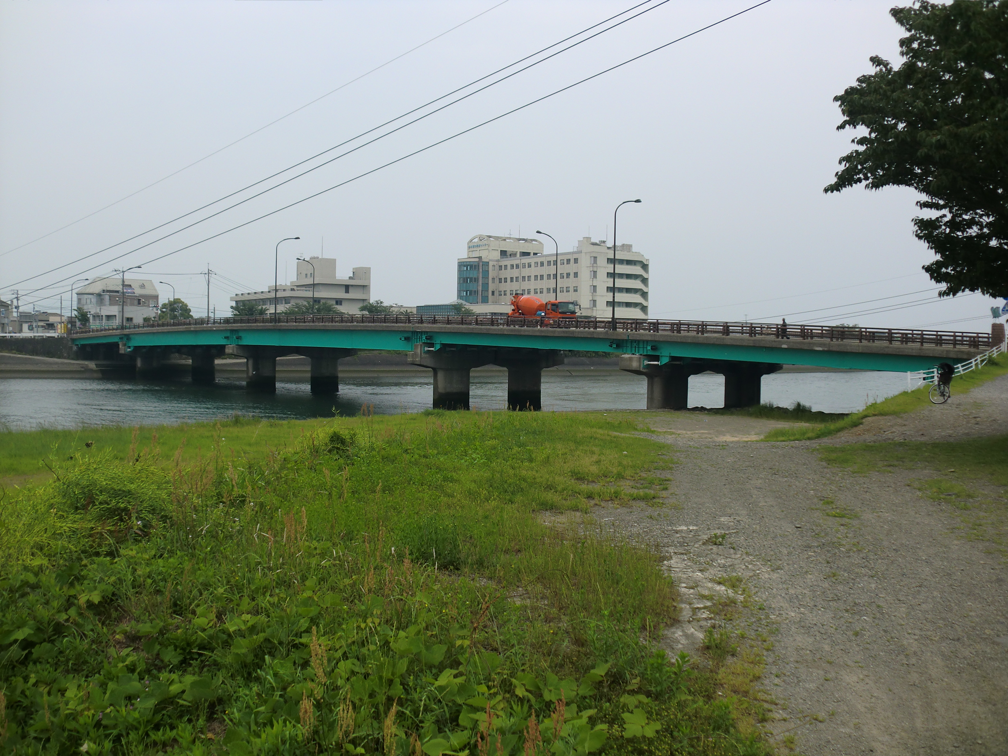 鹿児島県出水市にある米ノ津橋（こめのつはし）